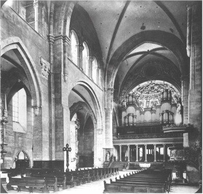 Die Trierer Domorgel (1837-1905) von Heinrich Wilhelm Breidenfeld (1798-1875)